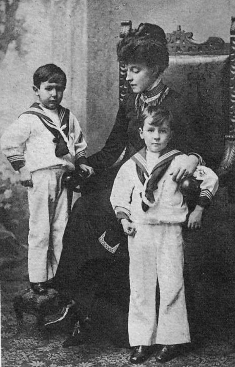 La Duchessa d’Aosta Elena con i figli Amedeo ed Aimone